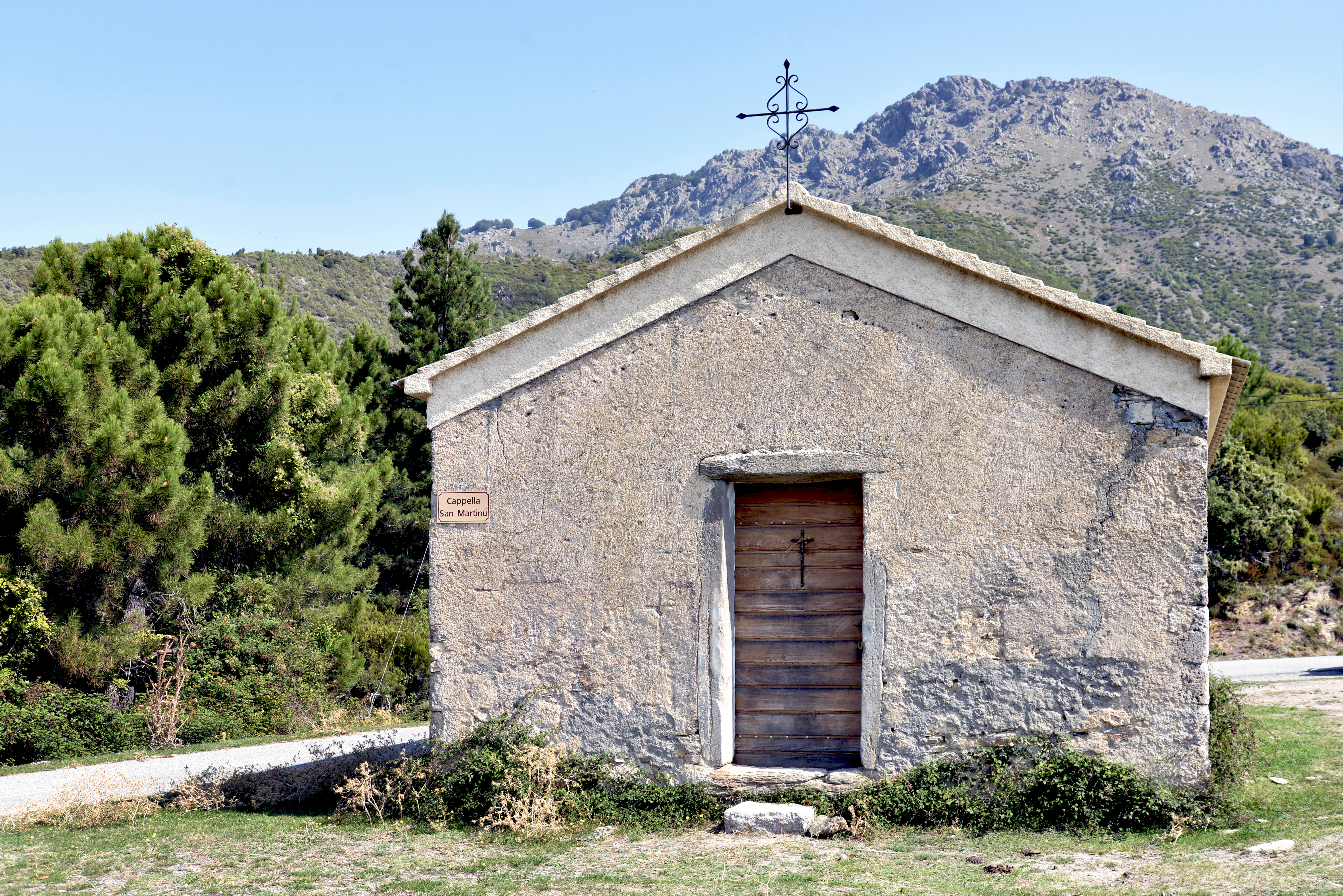 Castellare-di-Mercurio, Bozio (Haute-Corse) - La chapelle San Martinu, restaurée, située à 904 m d'altitude au col de la route D41 entre Sainte-Lucie et Castellare. À l'arrière-plan, le Monte Piano Maggiore (1581 m).